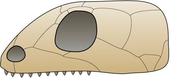 Skull of Anapsida